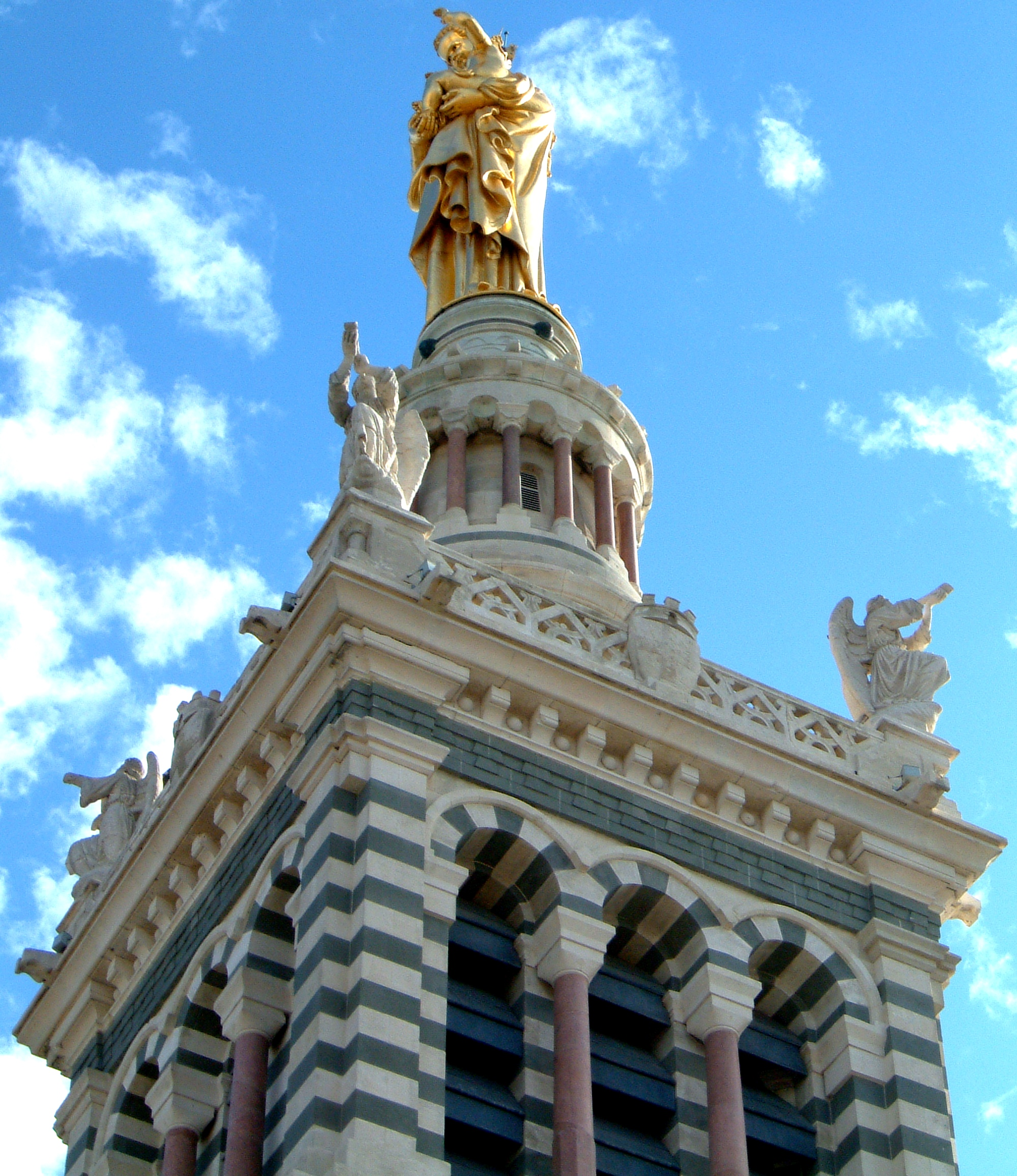 Marseille, Notre-Dame de la Garde: Das Jesuskind in den Armen der Mutter Maria.